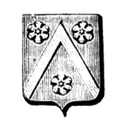 Blason de la famille du chevalier Guillaume Renault (nommée "De Reynaud" dans l'Annuaire de la noblesse de France et des maisons souveraines de l'Europe, Volume 25)